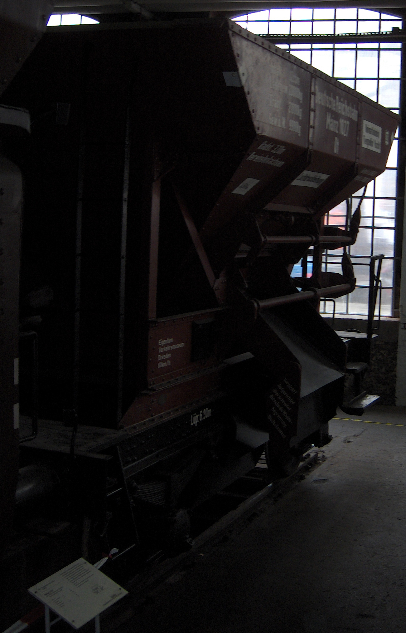 Talbot-Schotterwagen nach Skizze 370a und Grundsätzen des Austauschbaus. Fotografiert im Verkehrsmuseum Dresden.